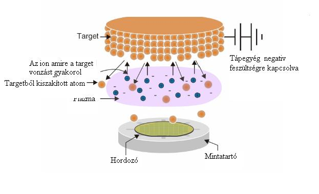 Az ioniál gáz ionjai a target felületéből atomokat szakítanak ki